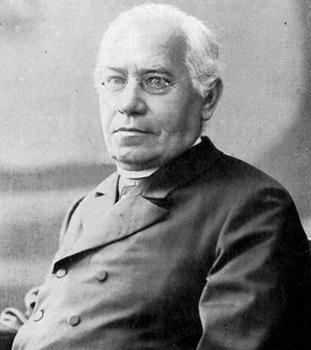 Portraitphoto: Michael Georg Haller (1840-1915), Regensburger Kirchenmusiker Stiftskanonikus und Komponist.